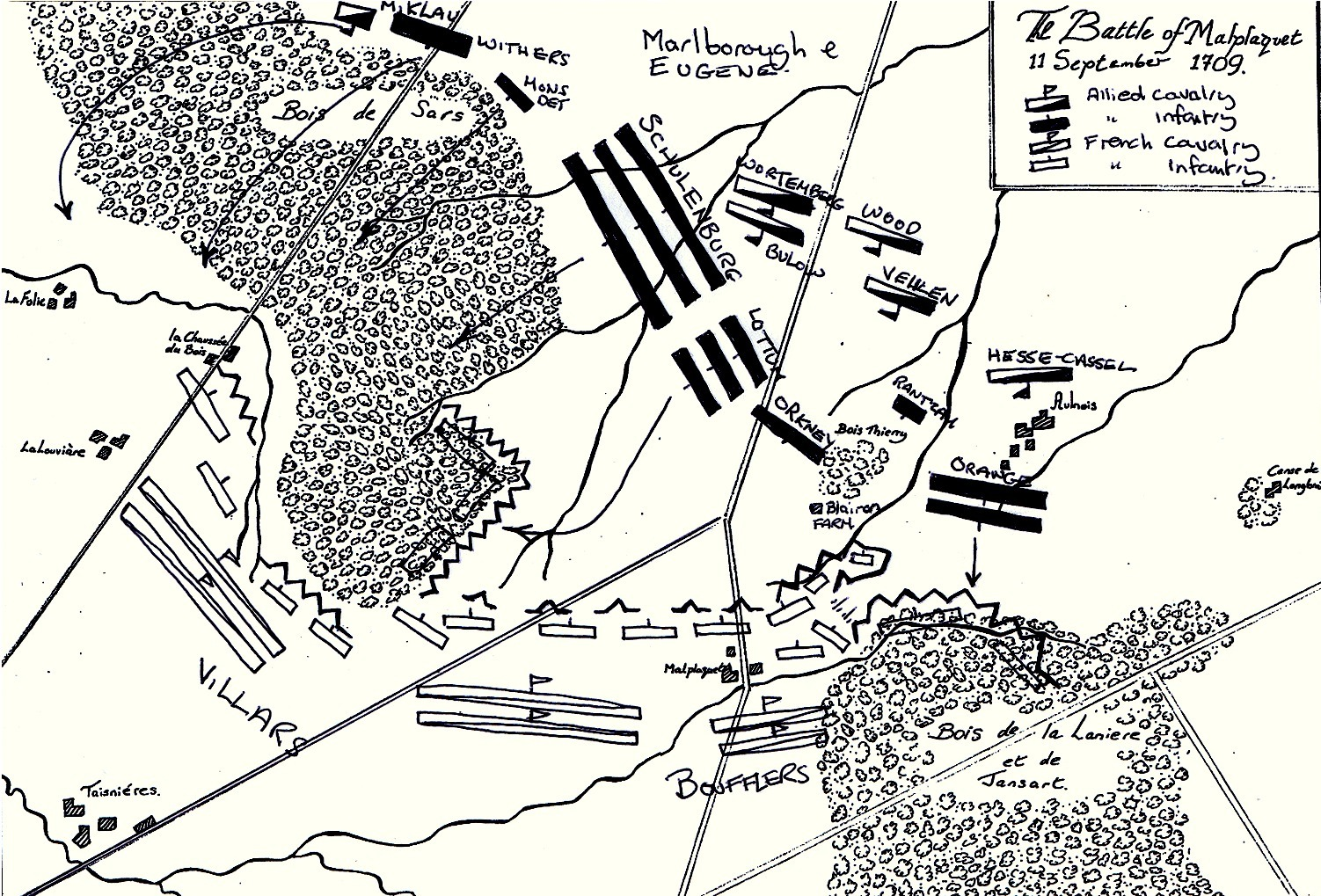 Dessin XVIIIe